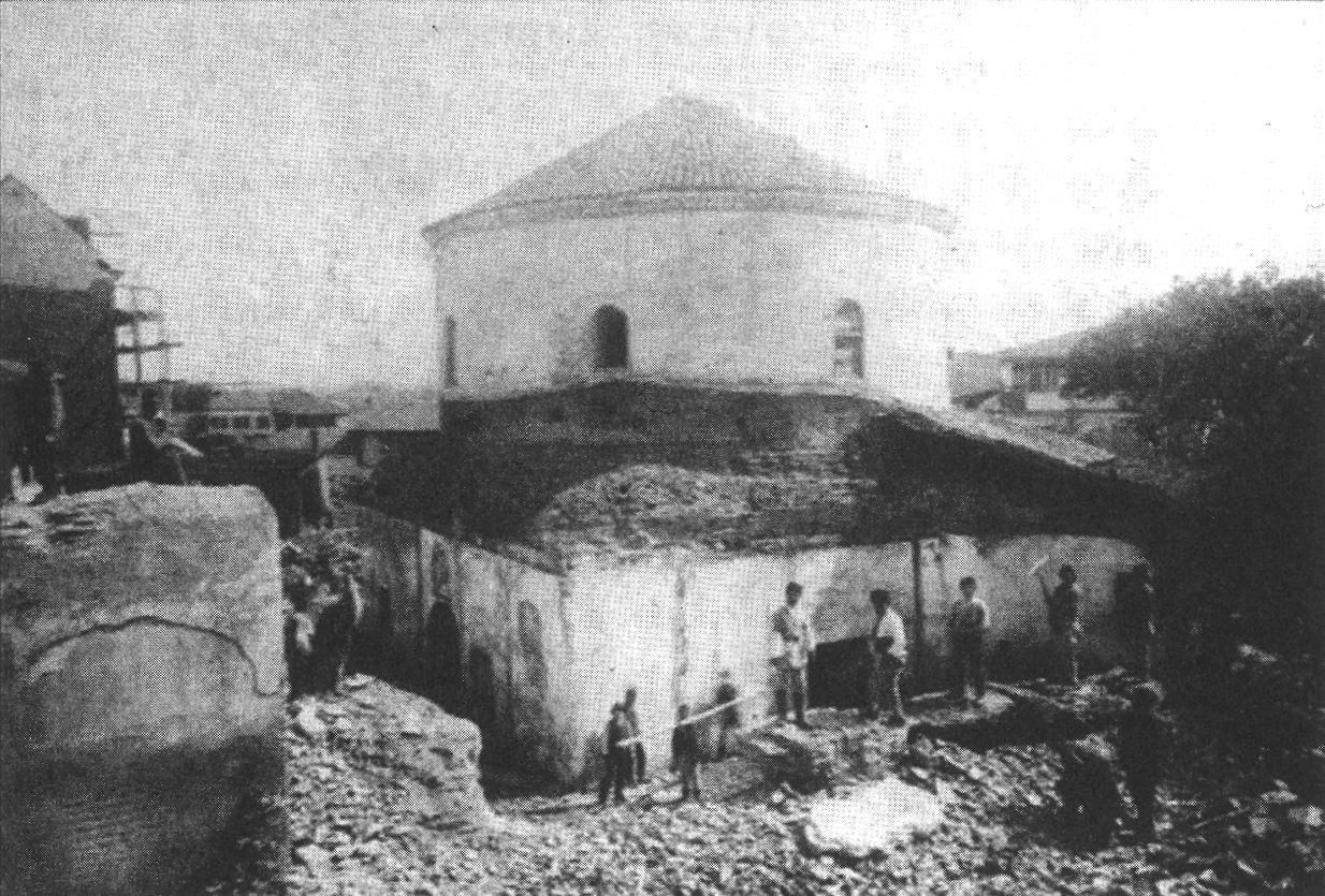 Ротондата Свети Георги в София, снимка от края на 19 век